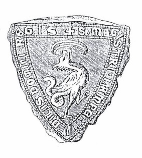 Hermán Lampert pecsétje 1314-ból (az oklevél 1313-as datálása helytelen)